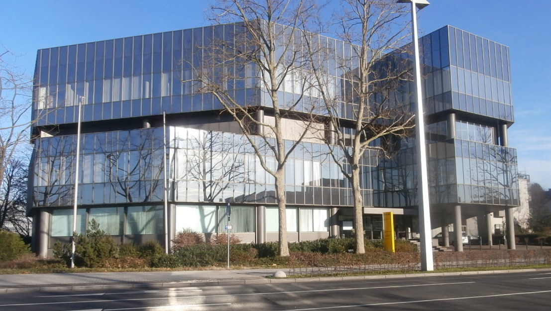 Ehemaliges Dienstgebäude der Landeszentralbank Bonn, Friedrich-Ebert-Allee 37–39, Bonn-Gronau